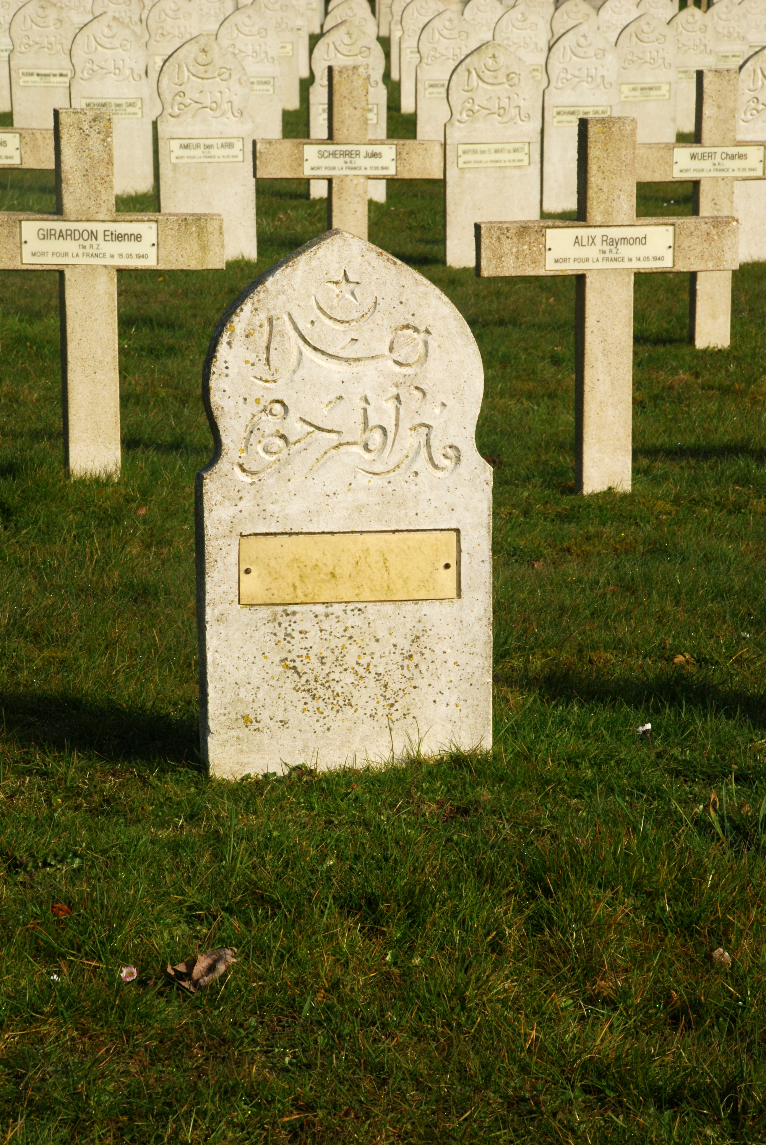 Belgique - Brabant wallon - Chastre - Nécropole française